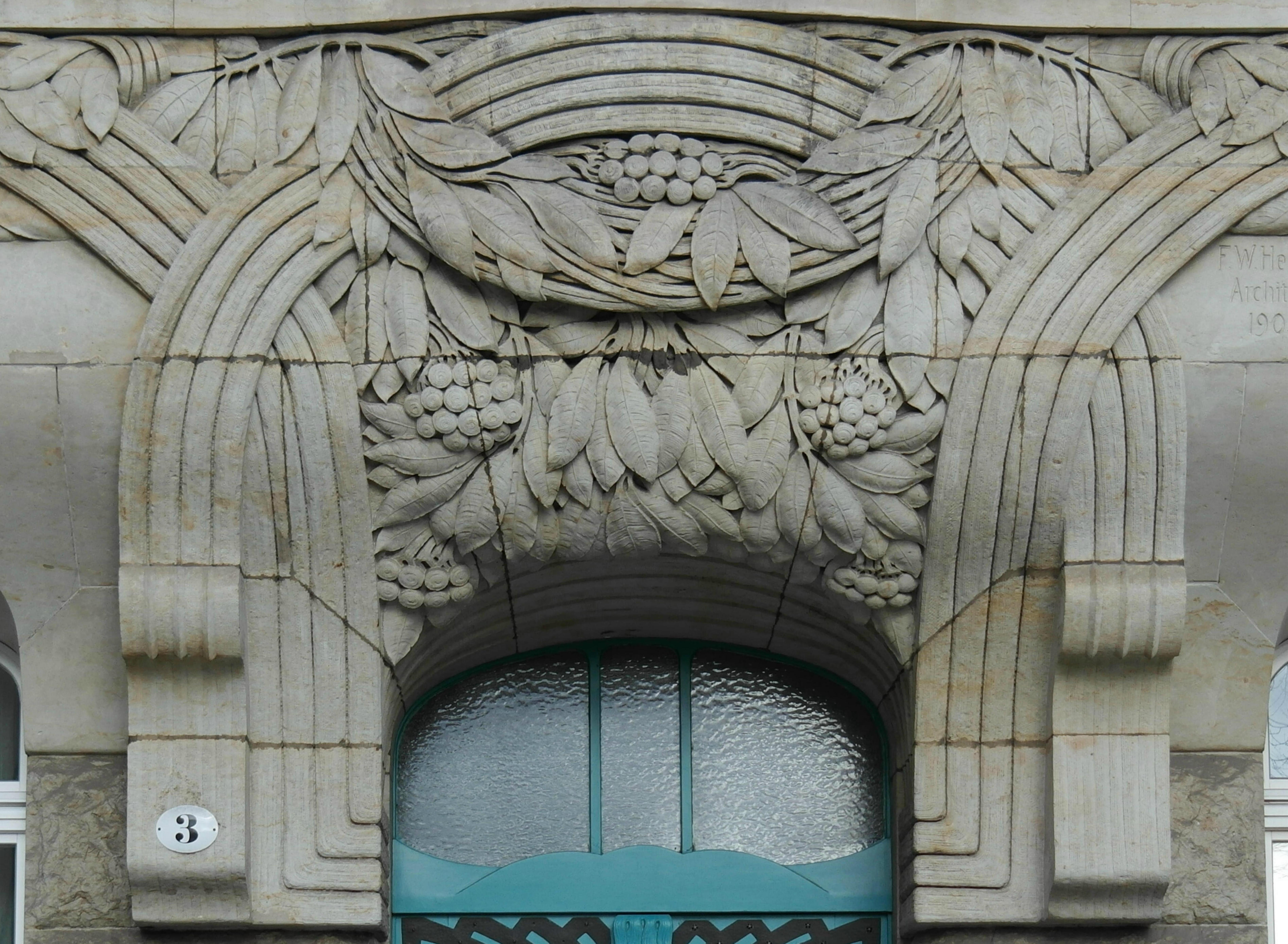 Dresden, Katharinenstrasse3, Eingangsportal aus Sandstein vom Dresdner Bildhauer Eduard Jungbluth - Detail.